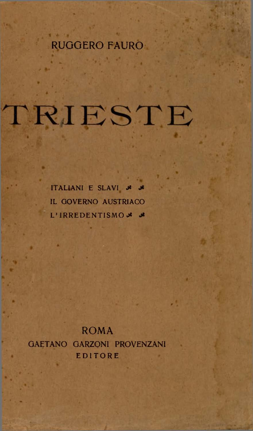 Trieste : italiani e slavi, il governo austriaco, l'irredentismo / Ruggero Fauro. - Roma : Garzoni Provenzani, 1914. - 238 p. ; 20 cm